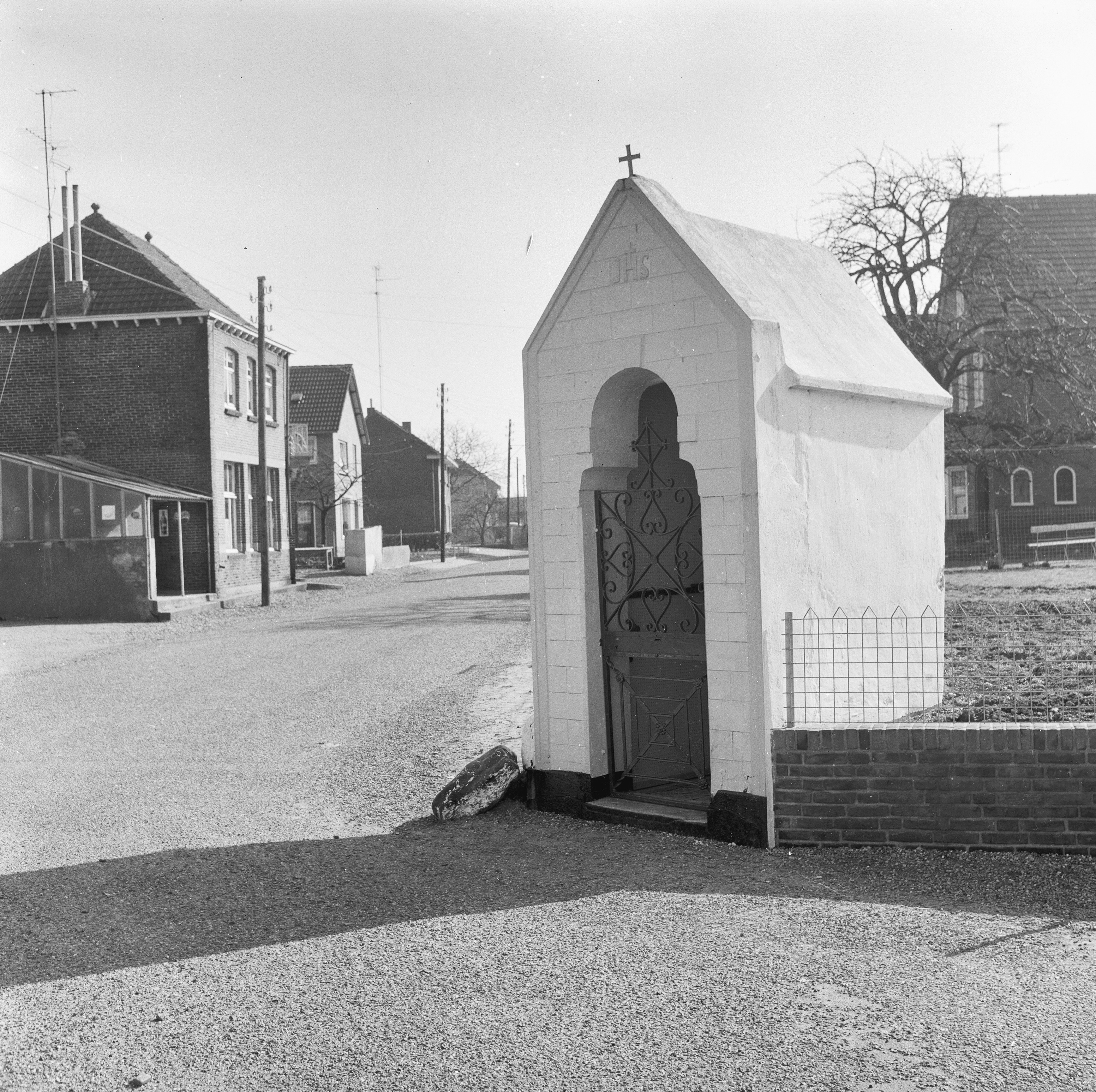 wegkapel